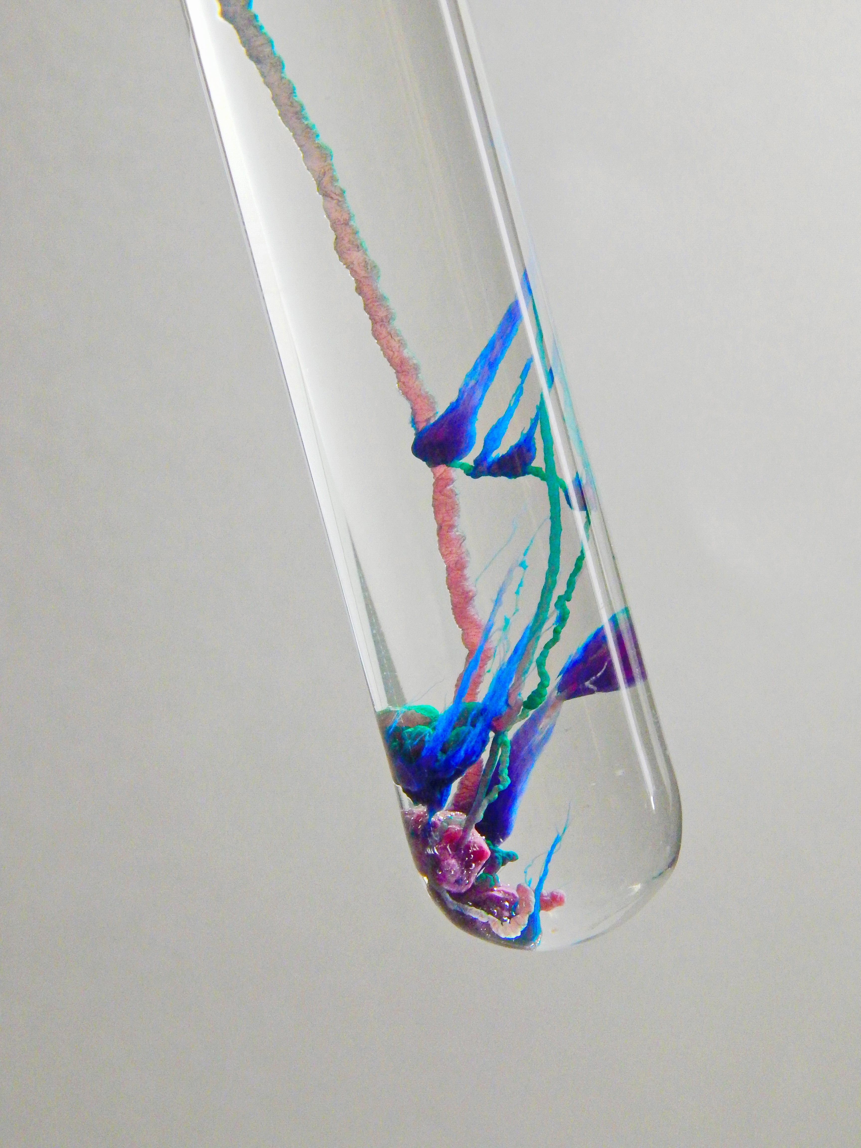 Silikatna bašta - kobalt.